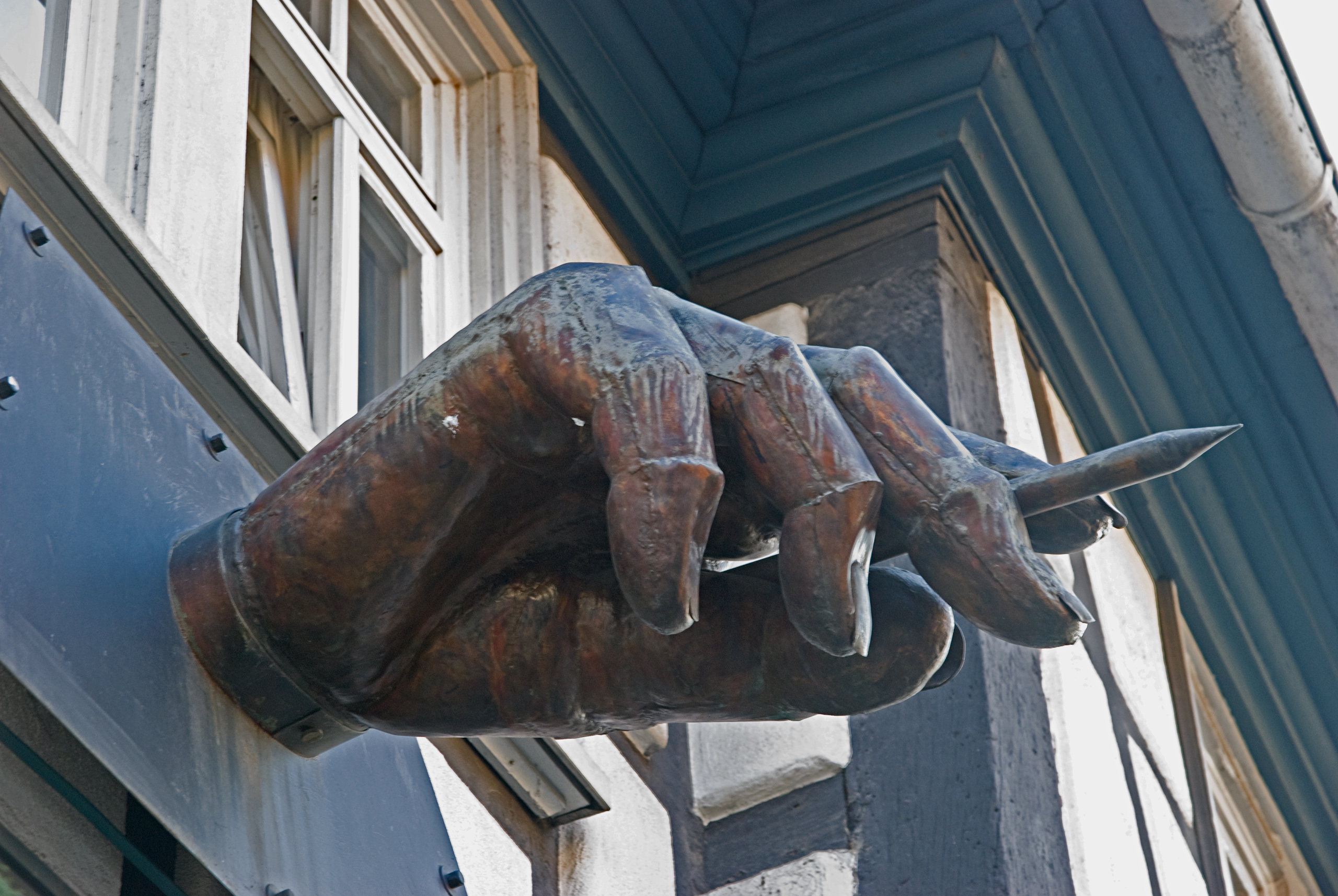 Die denkende Hand, Skulptur von Georg K. Glaser